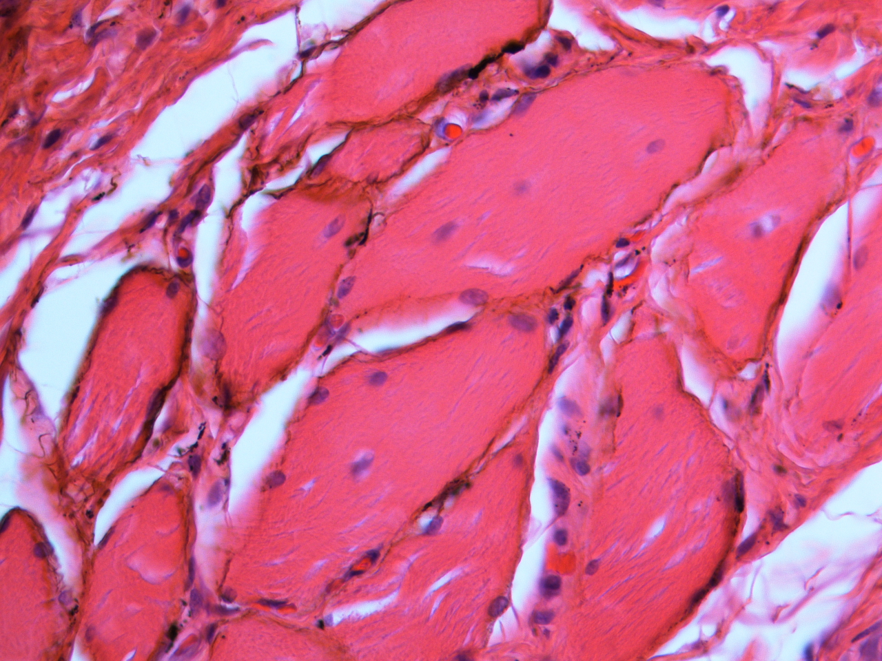 Amalgamtätowierung mit Ablagerungen von feingranulärem Silbersulfid im Bereich der Skelettmuskulatur der Mundschleimhaut